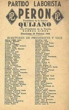 Boleta Partido Laborista, electores después de las elecciones presidenciales argentinas de febrero de1946.